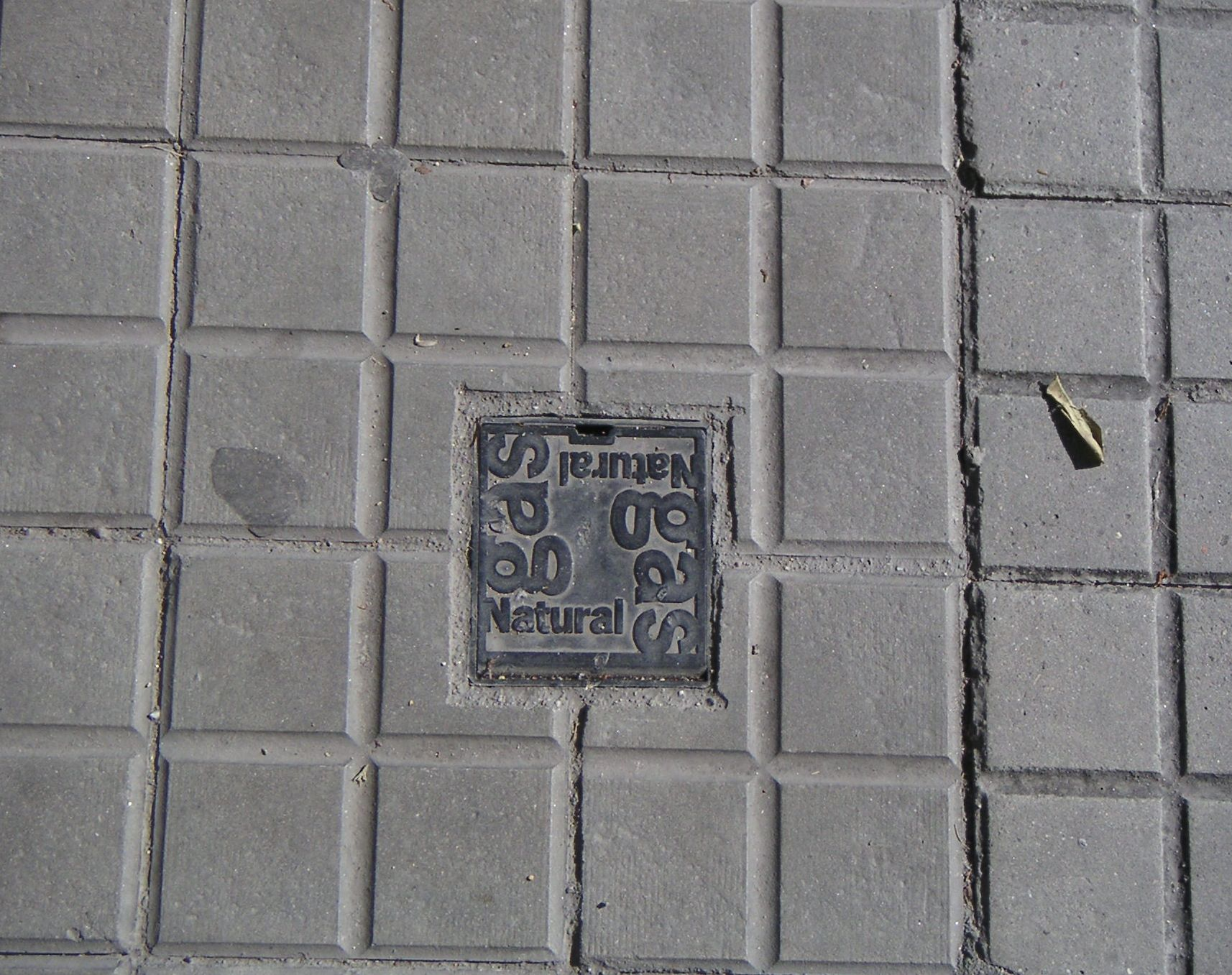 Terra típic barceloní.